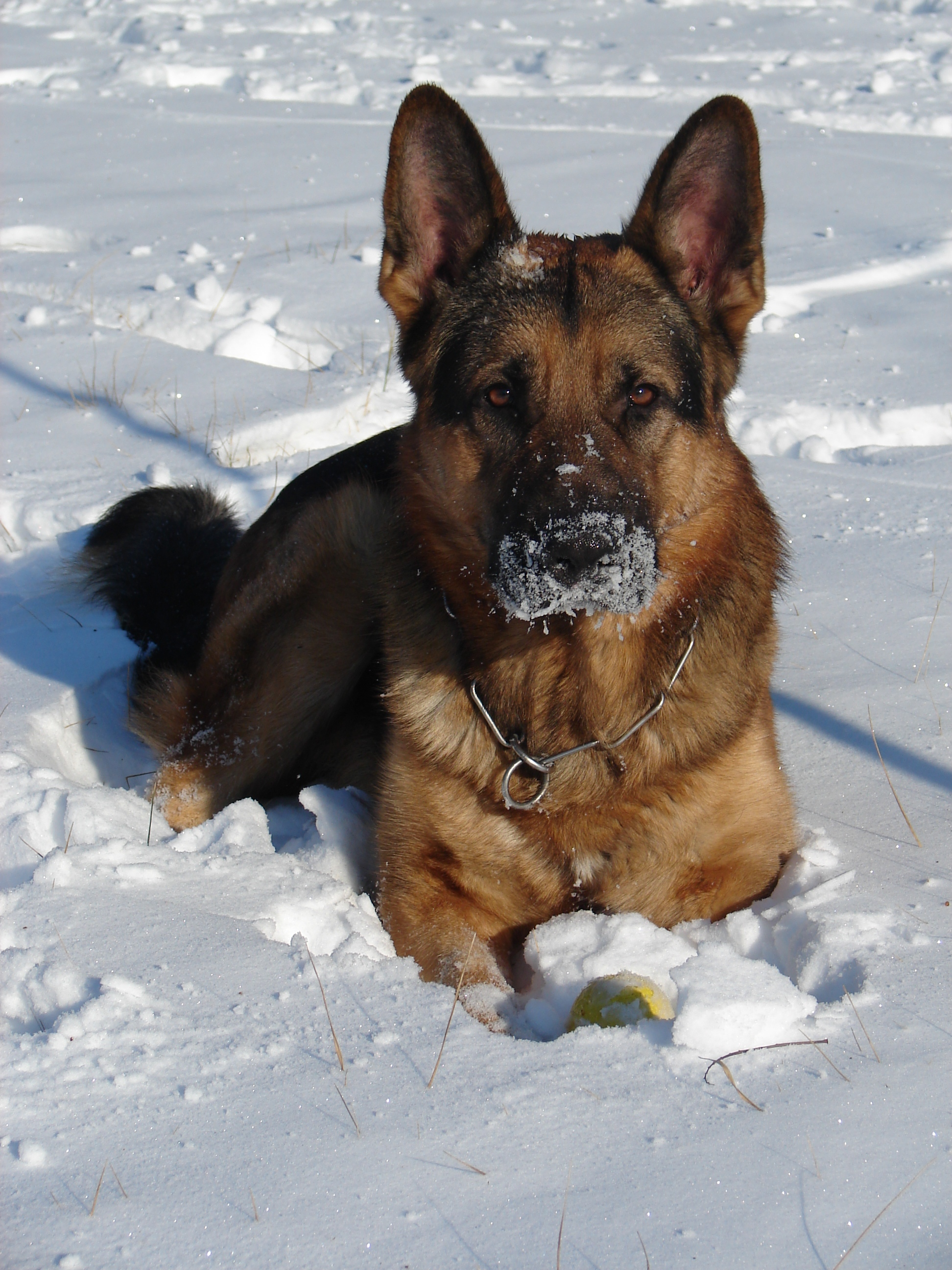 Немецкая овчарка зимой